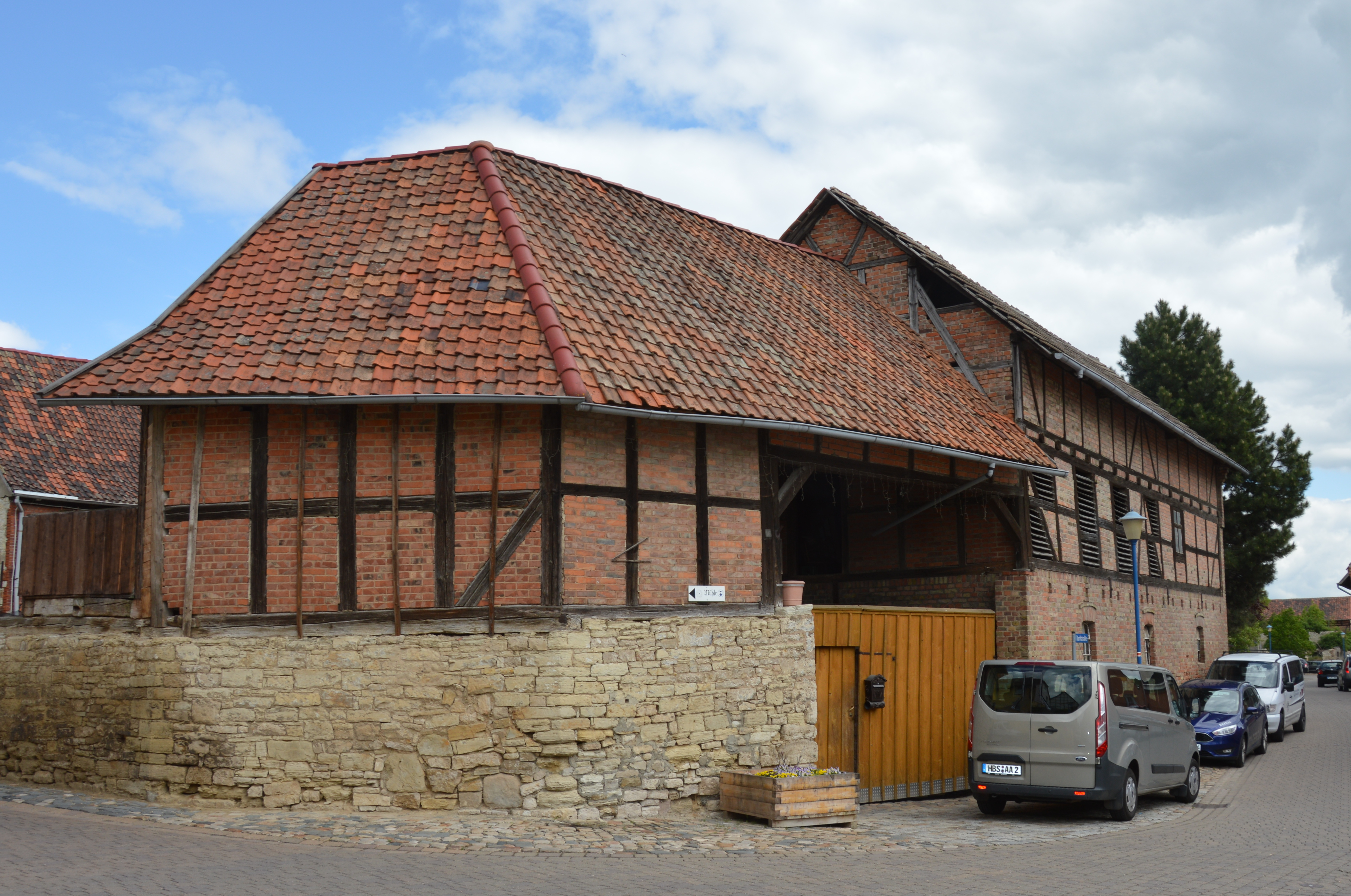 Haus Plan 16 in Klein Quenstedt